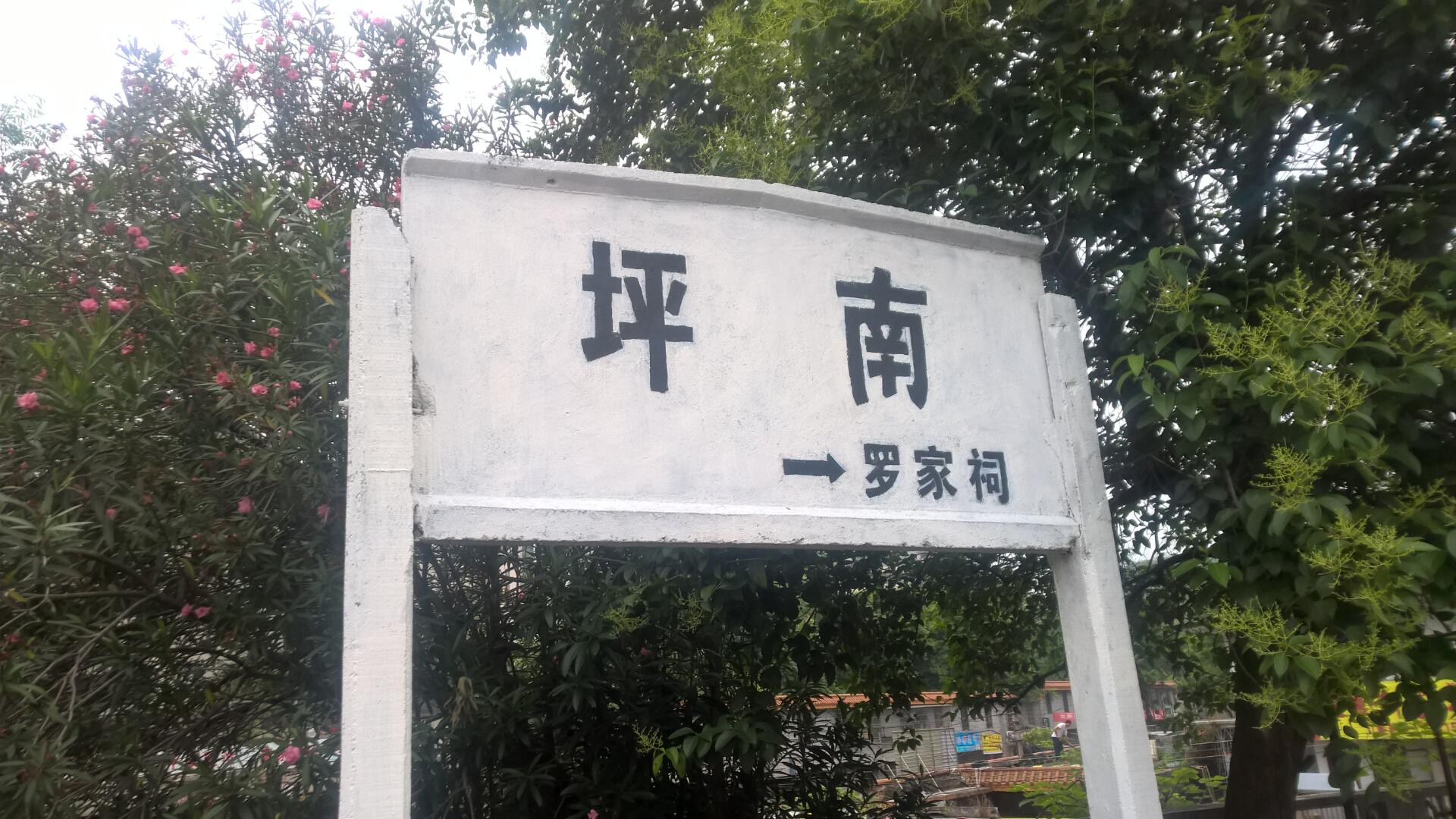 中文（中国大陆）: 坪南站站牌